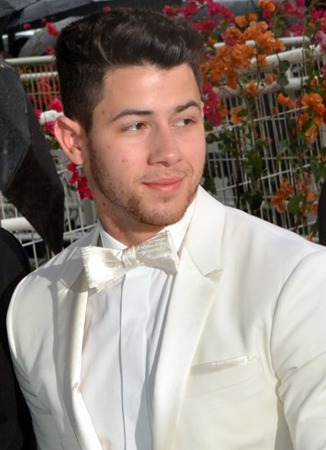 Nick Jonas au Festival de Cannes 2019.